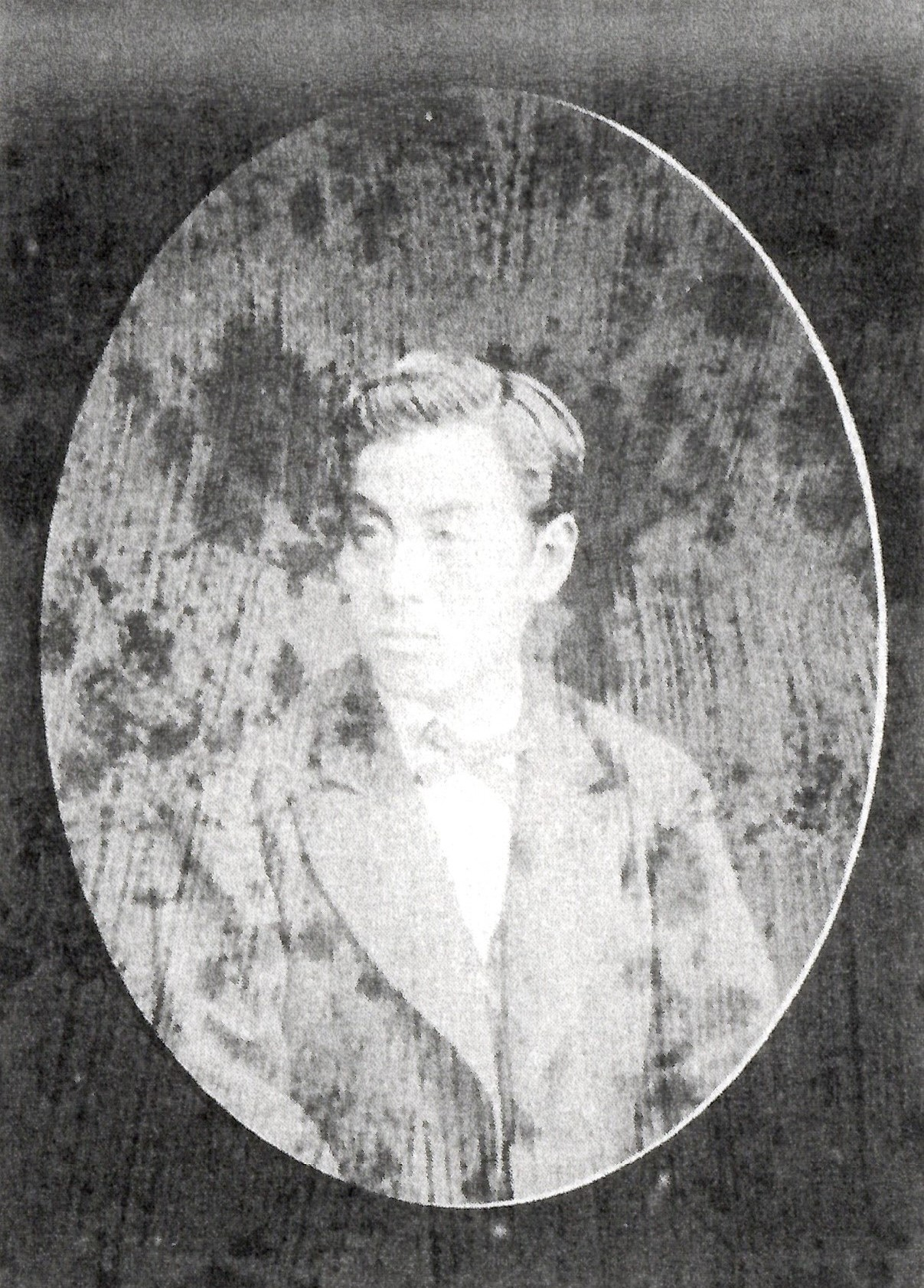 山崎治敏の肖像写真。